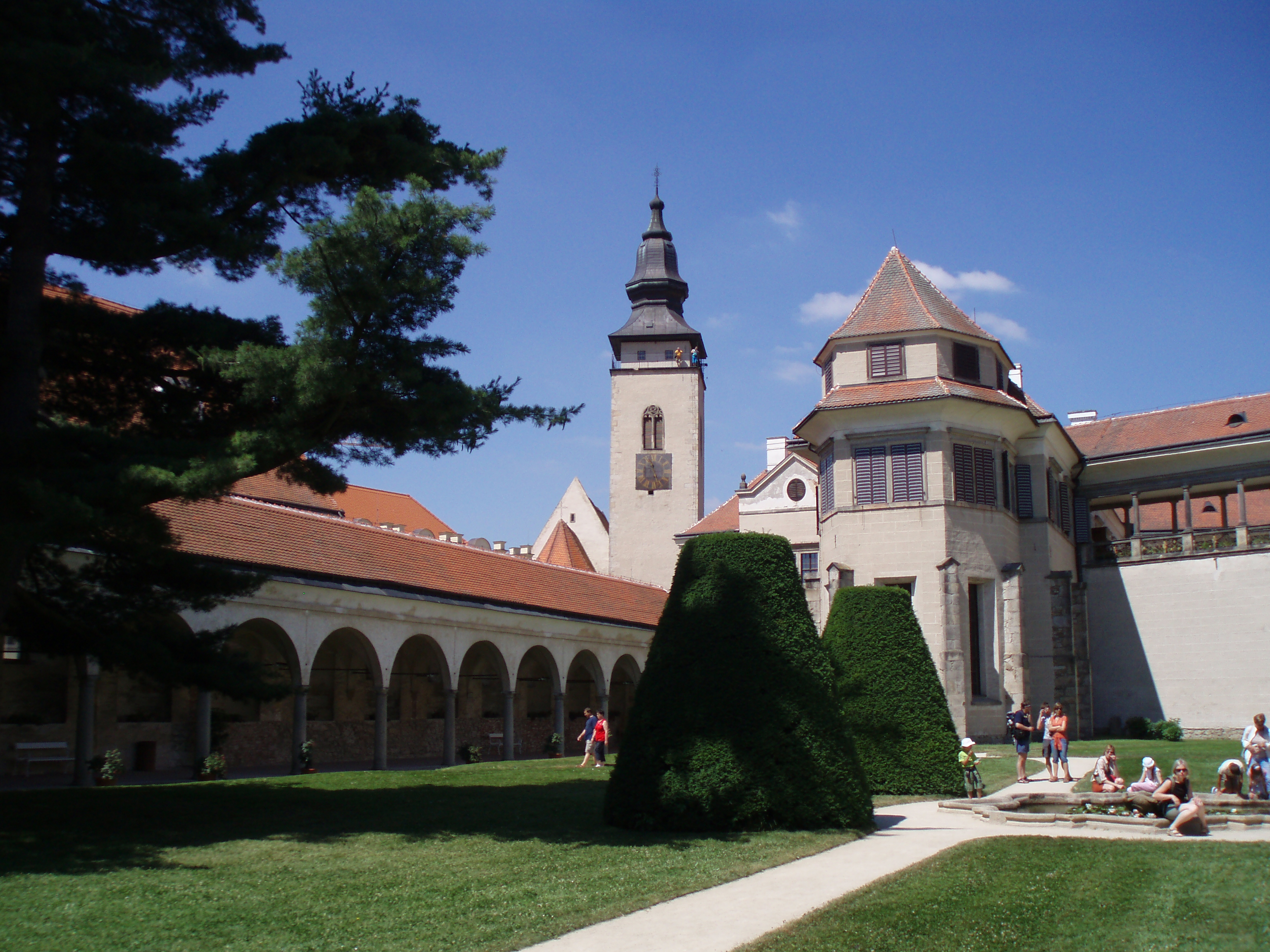 Zámek Telč, náměstí Zachariáše z Hradce 1, Telč-Vnitřní Město, Telč.